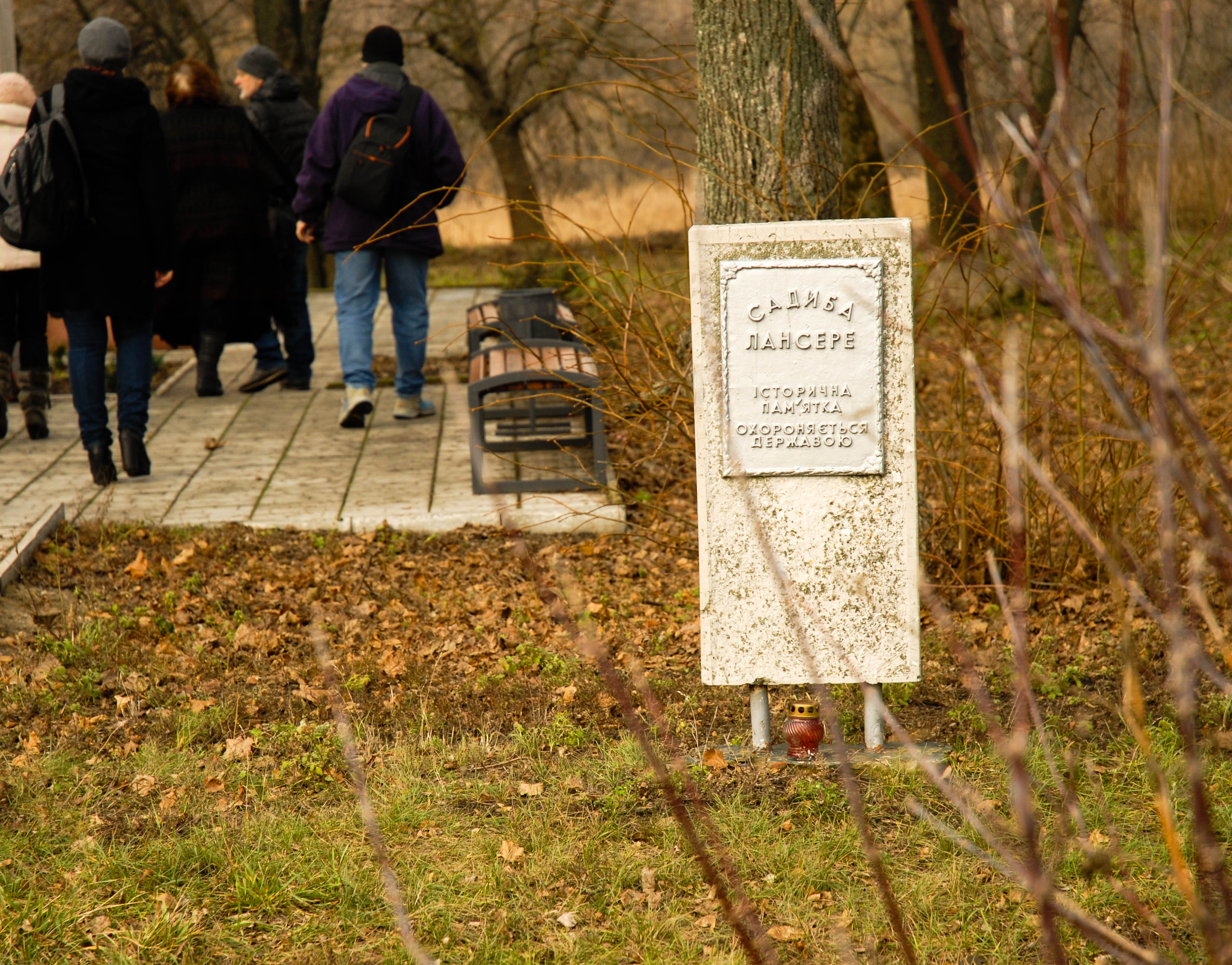 Історична пам'ятка. Охороняється природою